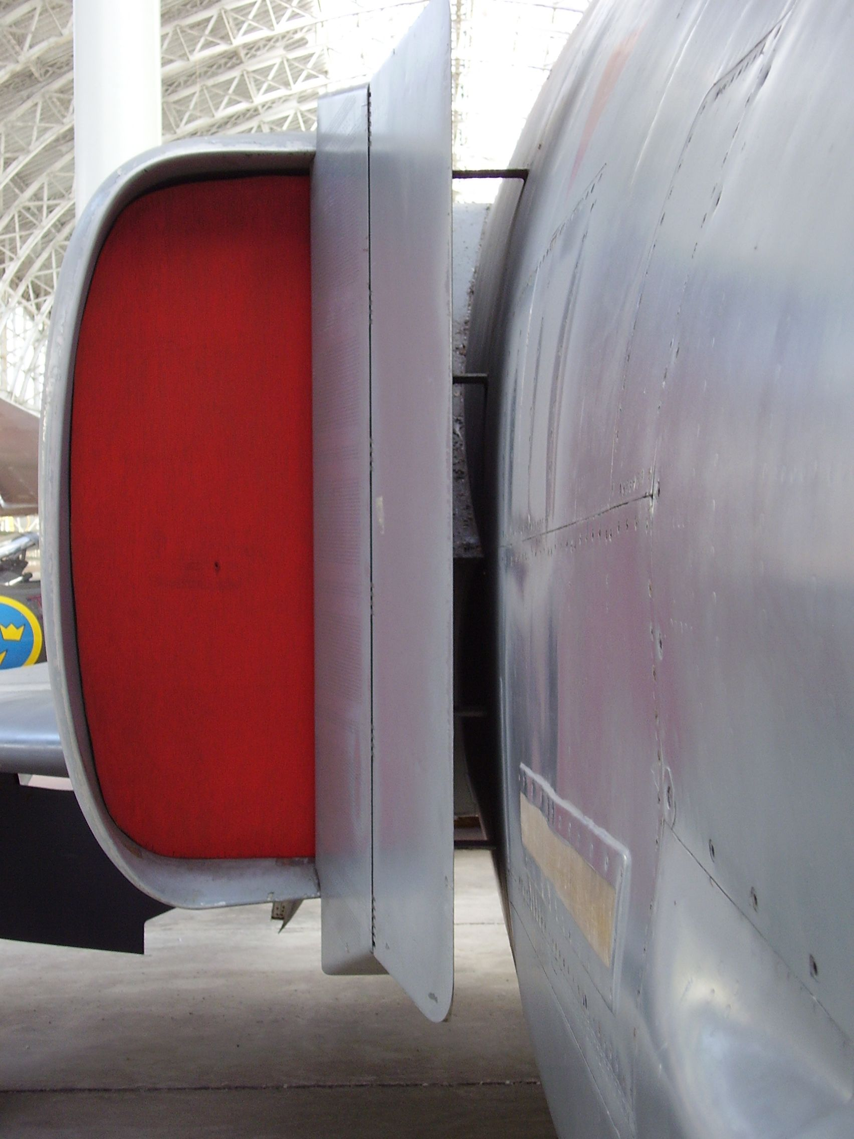 Royal Military Museum Brussels, Musée Royal de l'Armée, Koninklijk Museum van het Leger en de Krijgsgeschiedenis